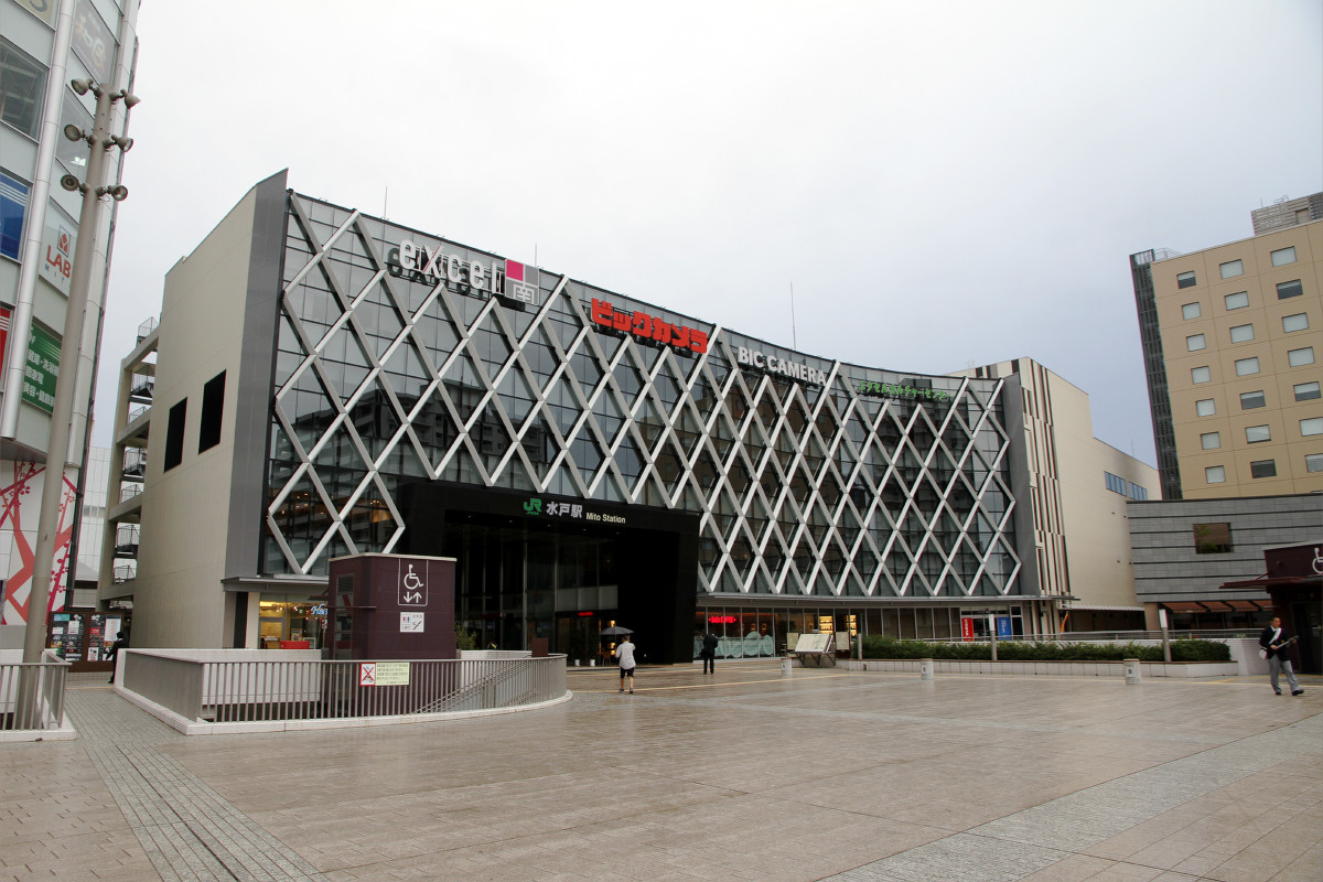 水戸駅南口（エクセルみなみ開業後）